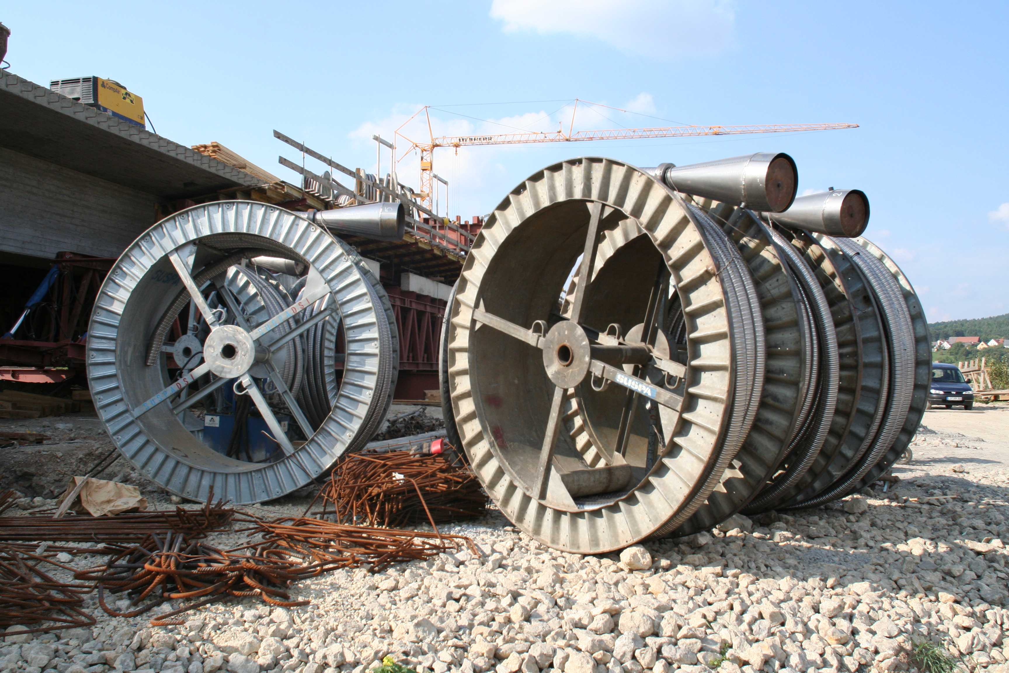 Spannkabelrollen, Maintalbrücke Lichtenfels